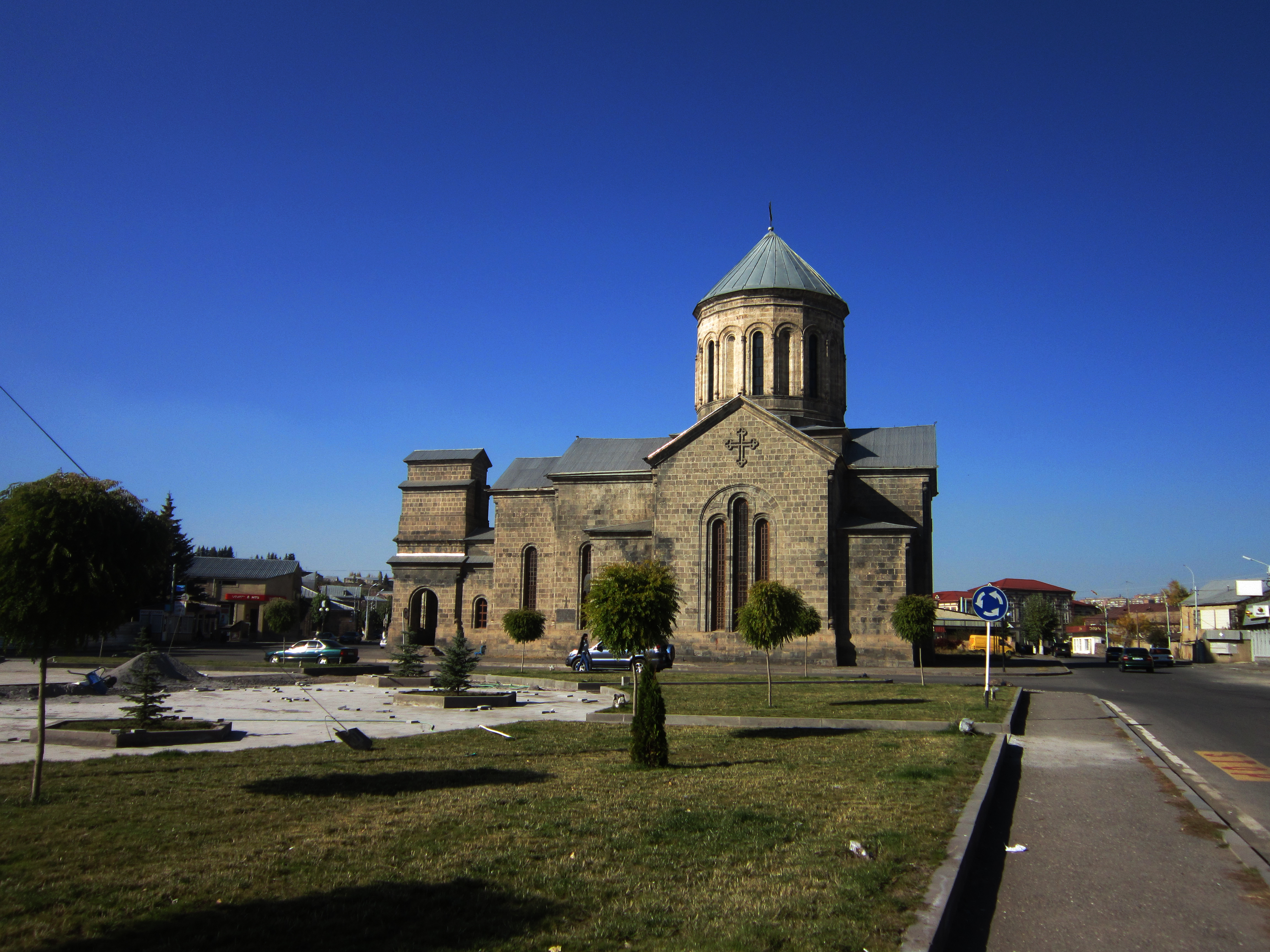 Եկեղեցի Սբ. Աստվածածին 1/20